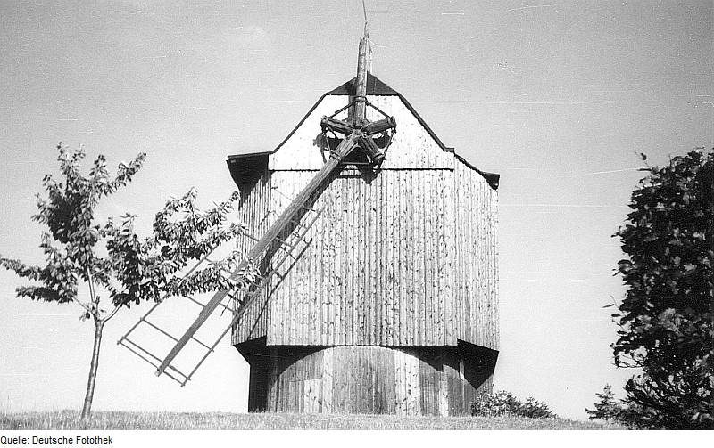 Original image description from the Deutsche Fotothek Leutersdorf-Hetzwalde. Hetzemühle